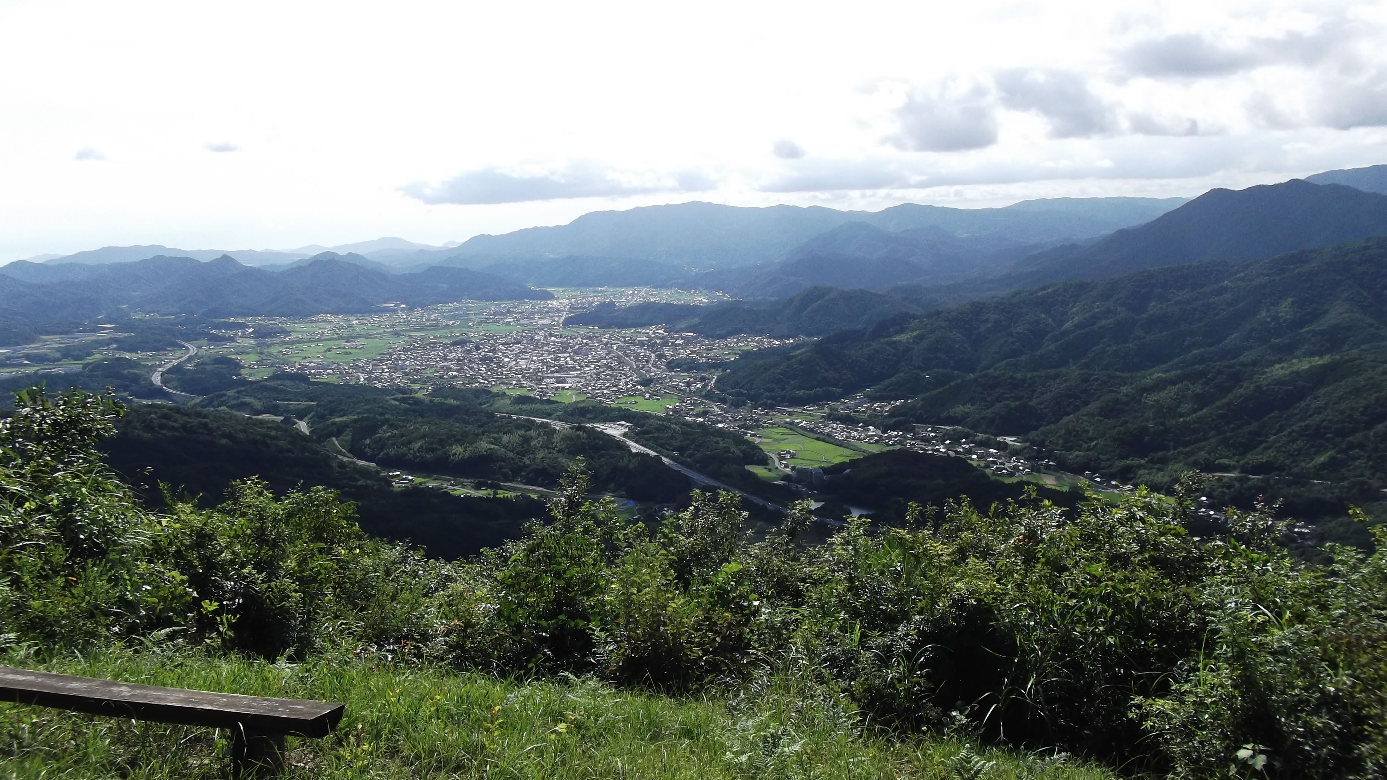 塔ヶ森からの玖珂市街